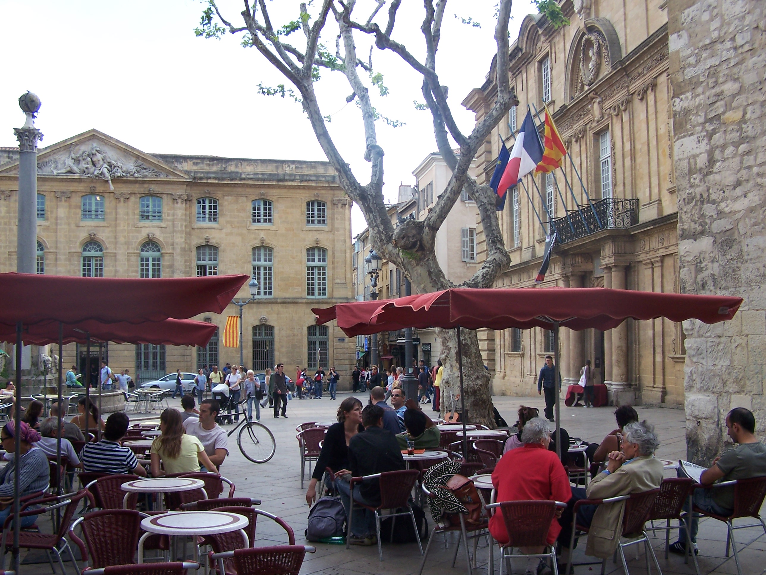 Hôtel de Ville d'Aix en Pce